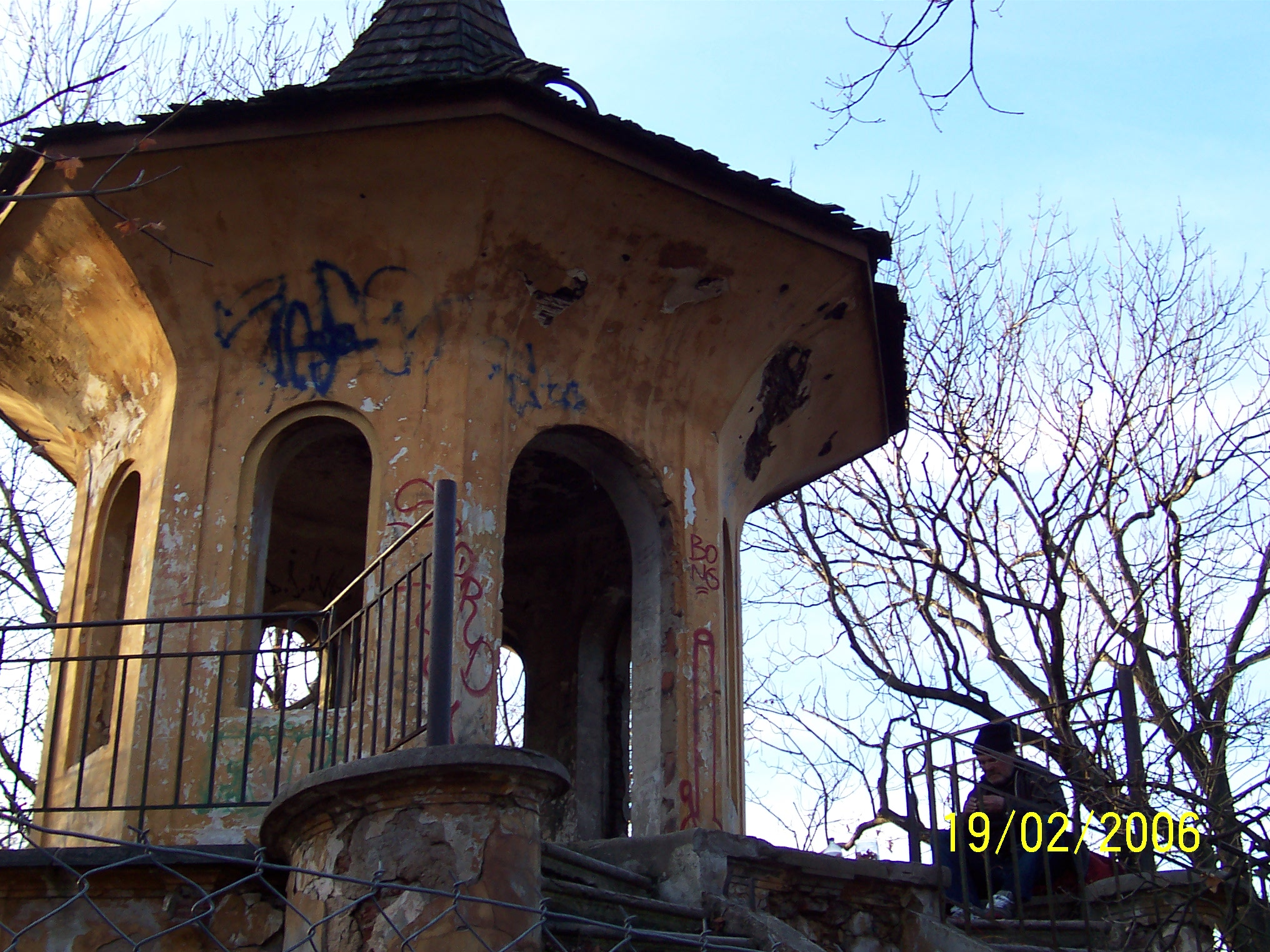 Čínský altánek, který se dnes stal útočištěm bezdomovců